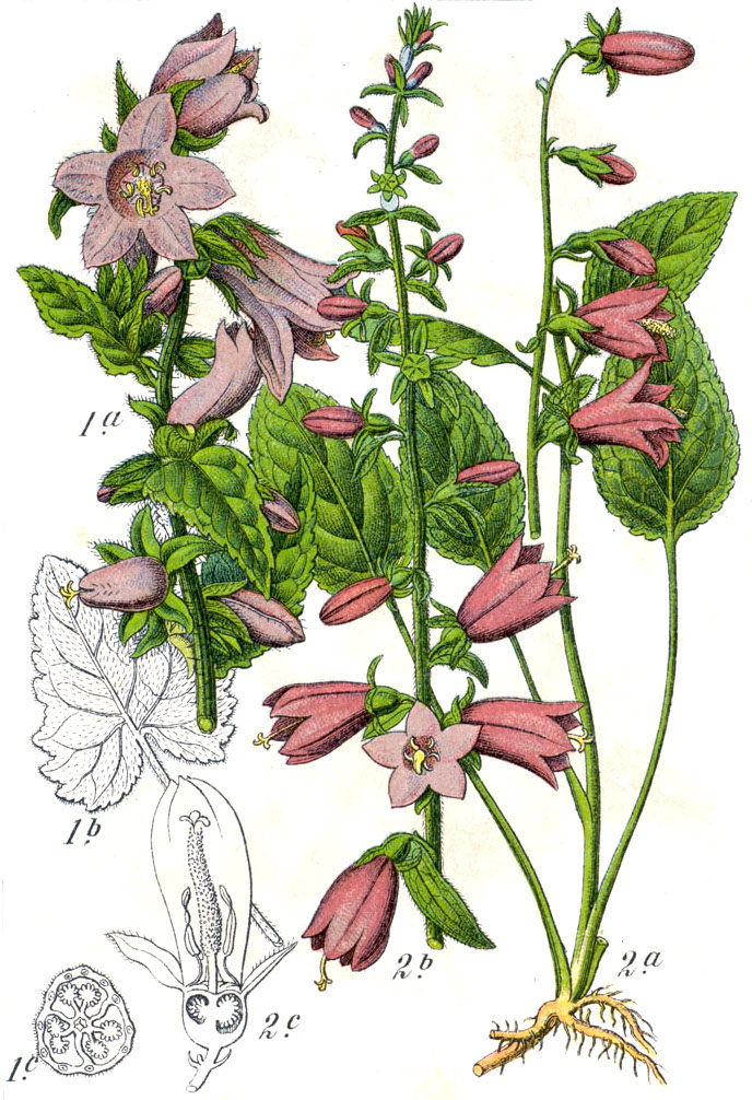 1. Campanula trachelium L. 2. Campanula rapunculoides L. Original Caption 1. Nesselblättrige Glockenblume, Campanula trachelium 2. Queckende Glockenblume, Campanula rapunculoides